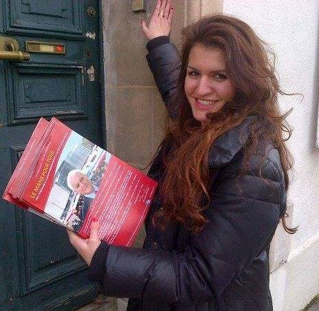 Marlène Schiappa lors du porte à porte de la campagne le mans pour tous